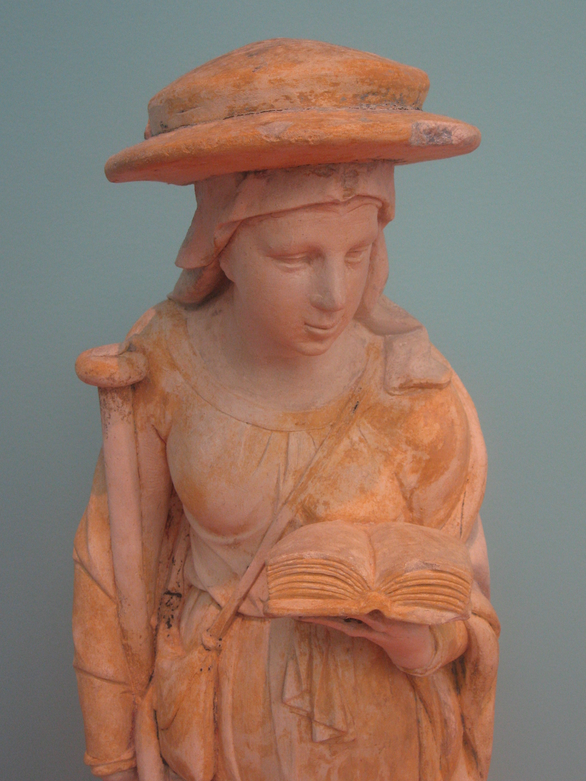 Exposition "Le Beau XVIe siècle". Sainte Syre, vers 1540, statue, calcaire, polychromie ancienne en voie d'effacement. Premierfait (Aube) - Classé Monument historique le 27.12.1913